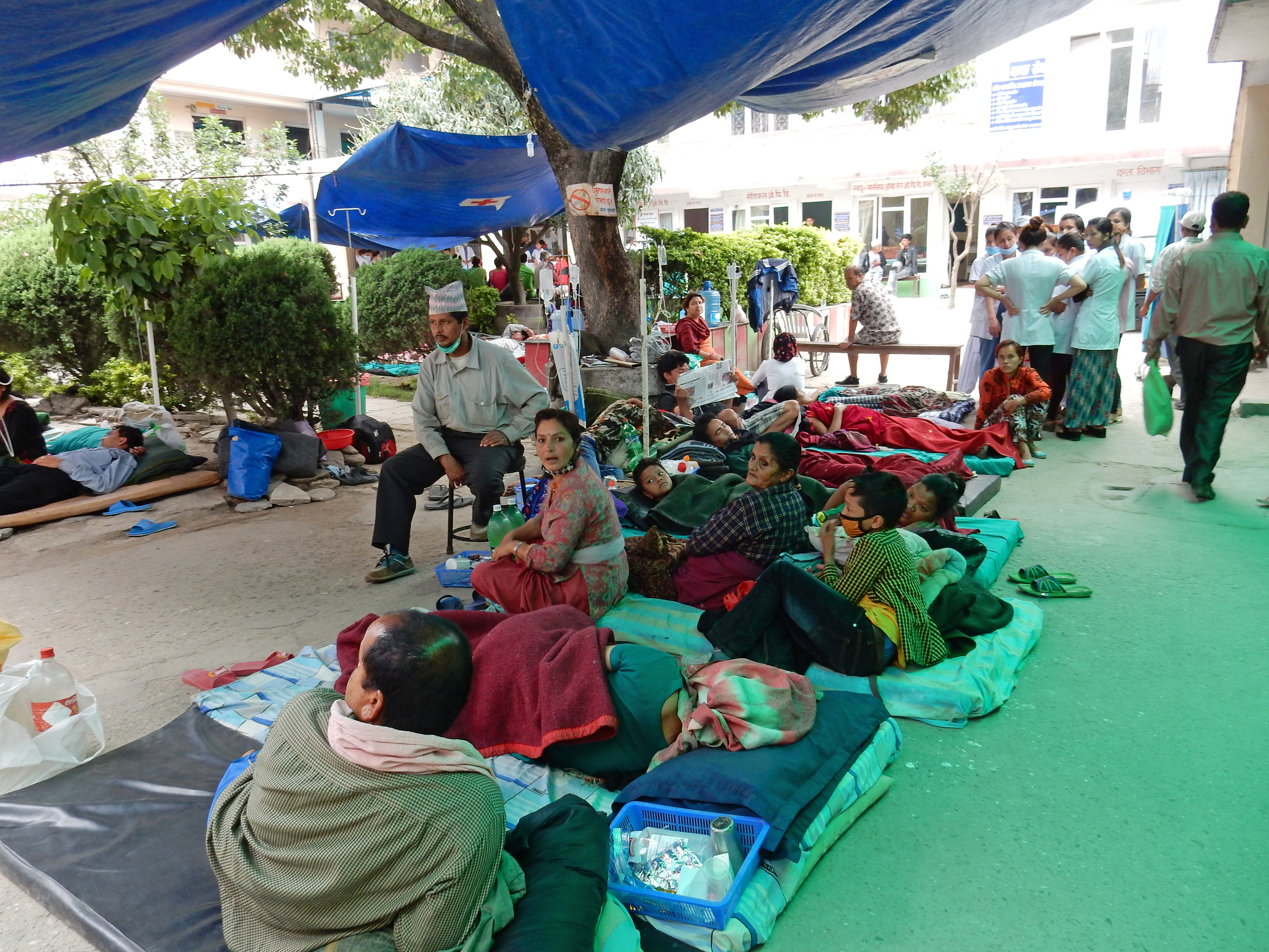 Die medizinische Versorgung in Nepal erfolgt auch Mitte Mai aufgrund Traumatisierung von Patienten und Personal teilweise noch im Freien vor den Krankenhäusern, hier vor dem Sahid Memorial Hospital im Stadtteil Kalanki, 27°41'40.4"N 85°16'51.8"E )